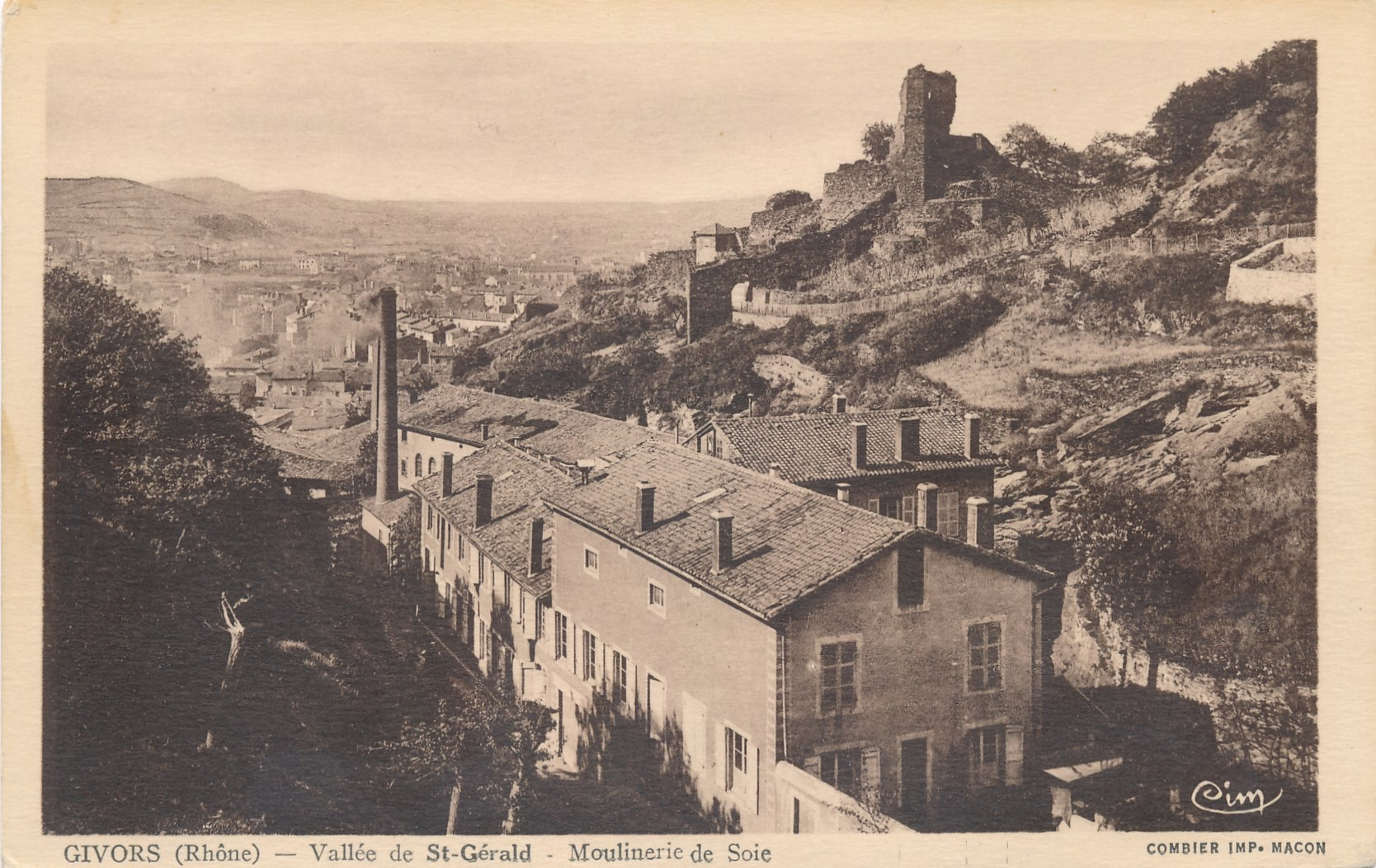 Moulinerie de soie, Givors. Env. 1900. Archives municipales de Givors, cote 5Fi 1886